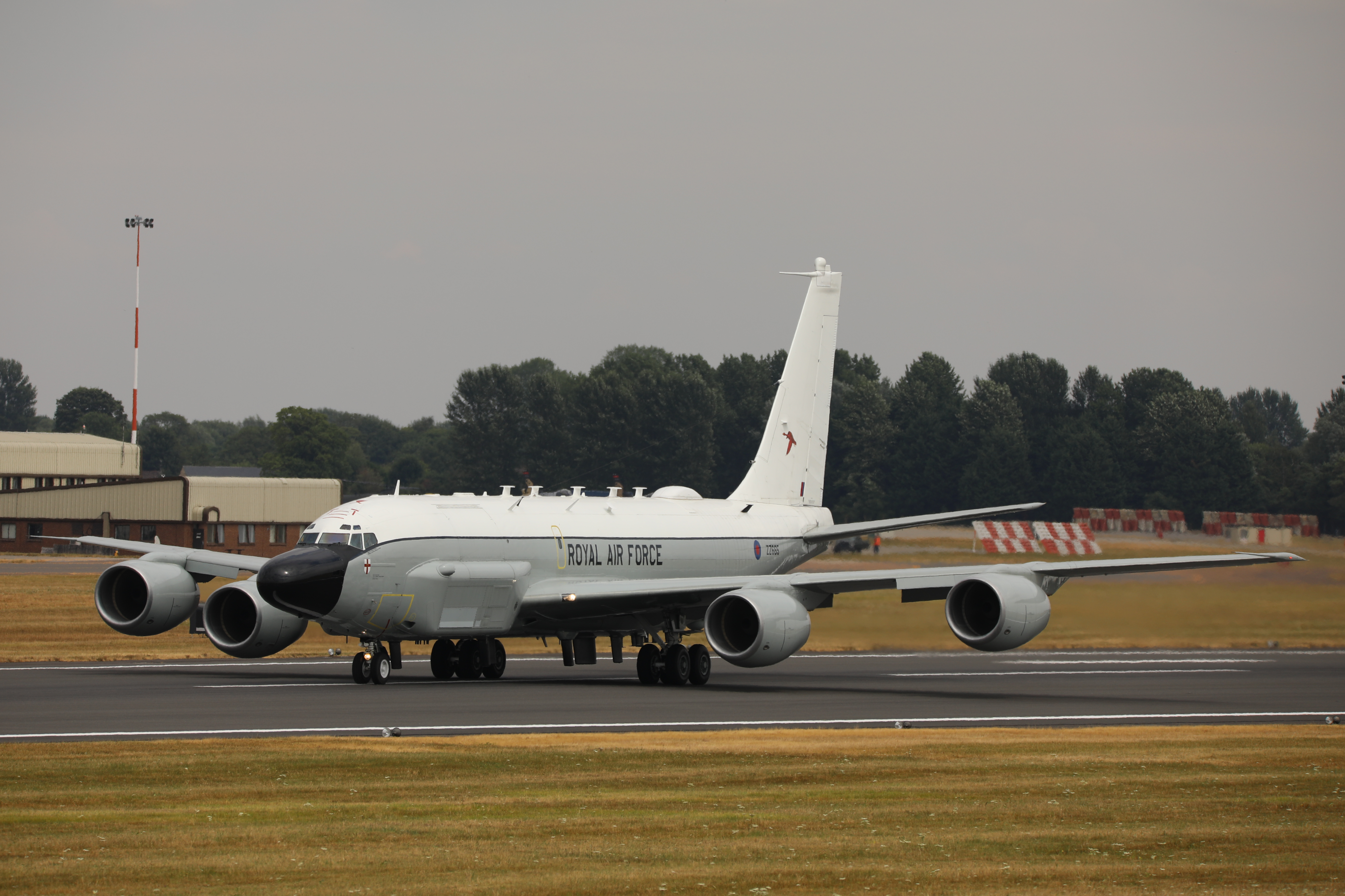 Boeing RC-135 Rivet 5D4_1213